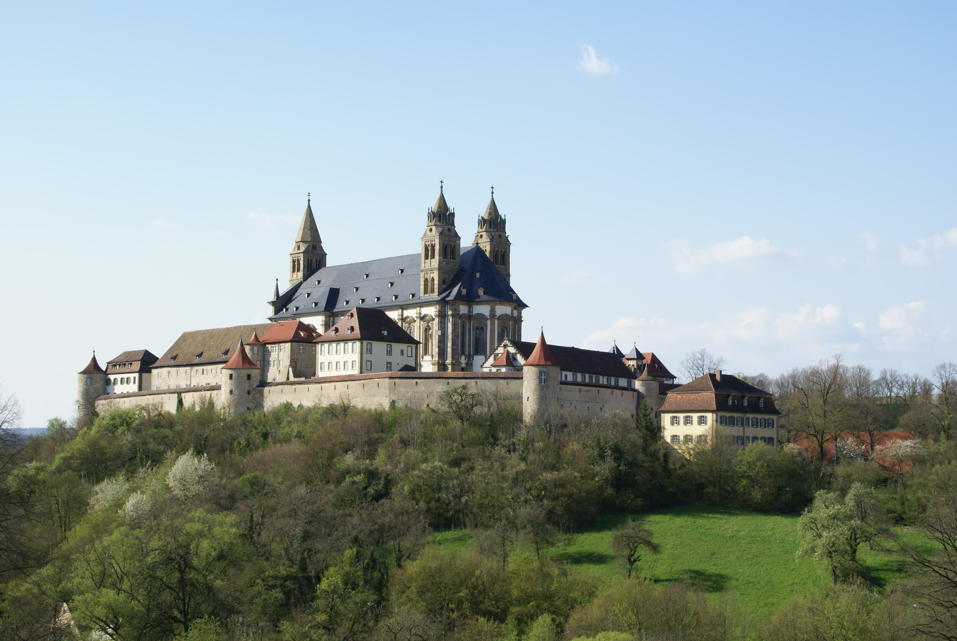 Die Großcomburg in Schwäbisch Hall-Steinbach